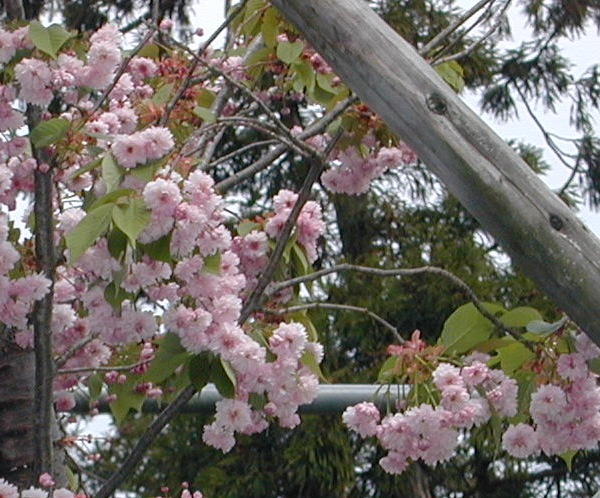 数珠掛桜。越後七不思議の一つ。